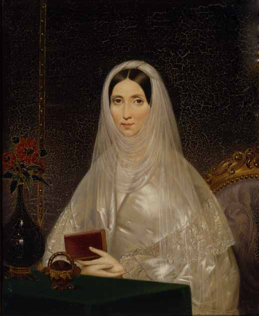 Татьяна Борисовна Потемкина (1797-1869), ур. Голицына, с 1815 года жена жена действительного тайного советника A. M. Потемкина, статс-дама, благотворительница